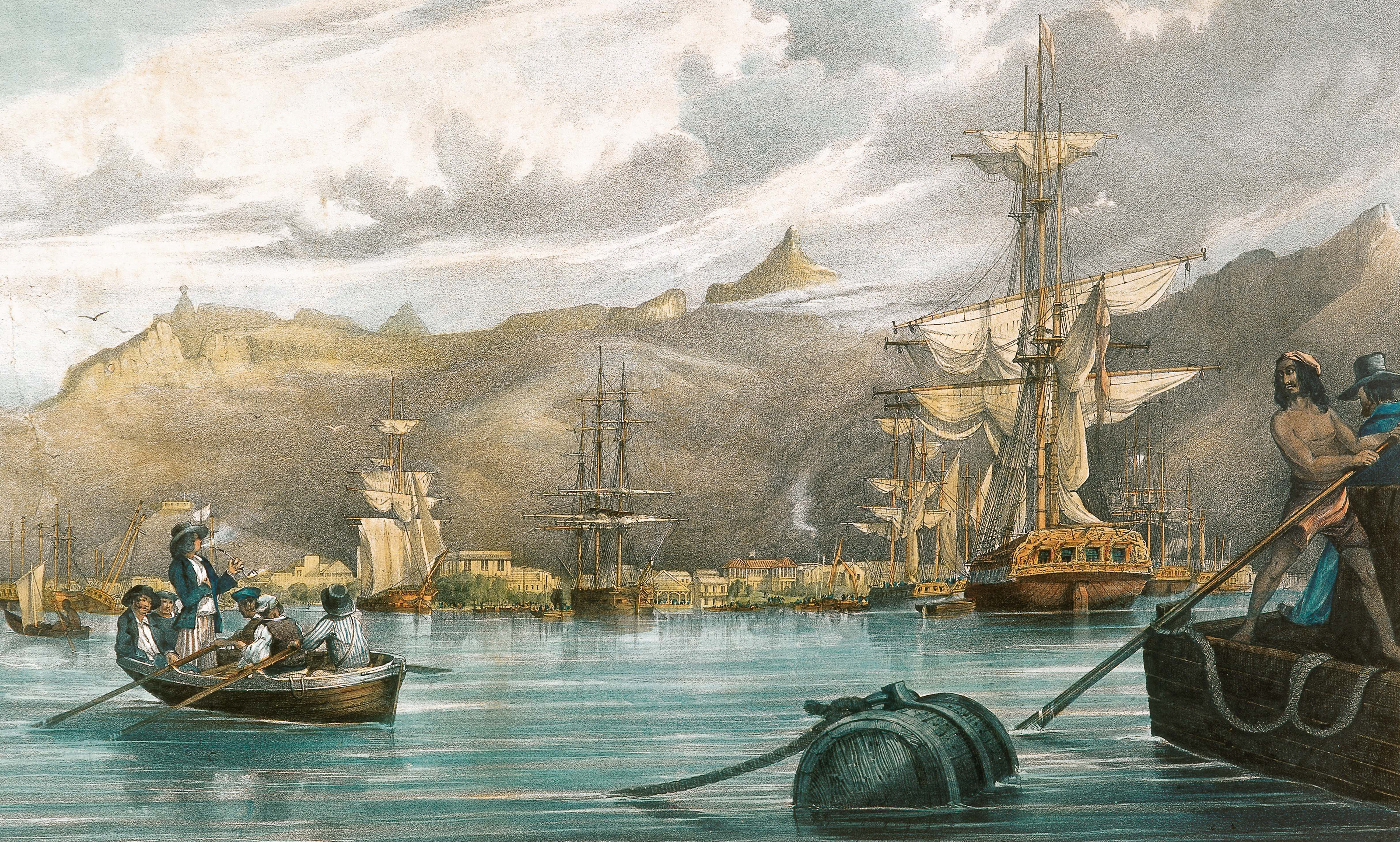 Gravure du Port-Louis, mise à la disposition par le Blue Penny Museum, Le Caudan Waterfront, Port Louis, Mauritius. ©.